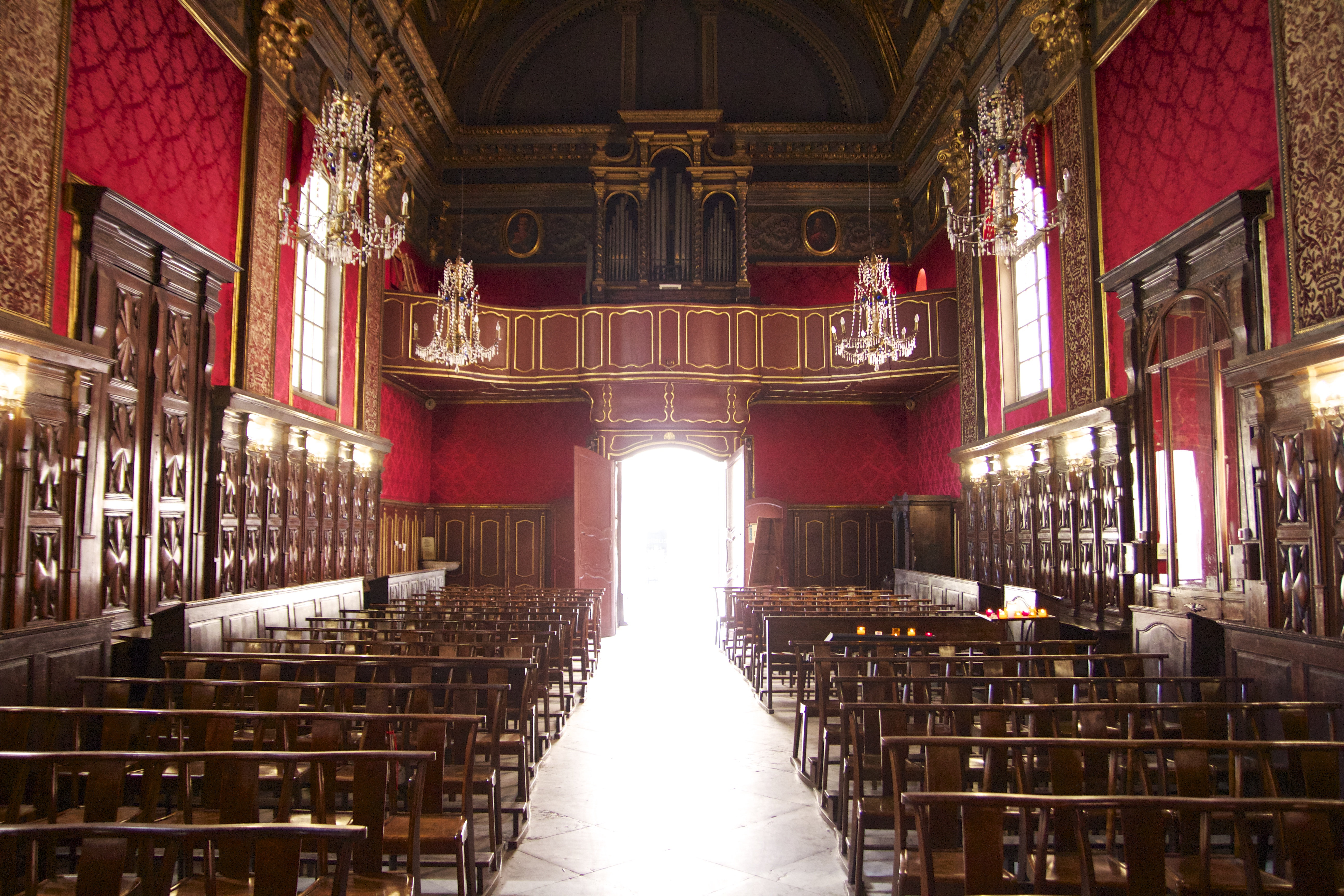 Église de la Conception